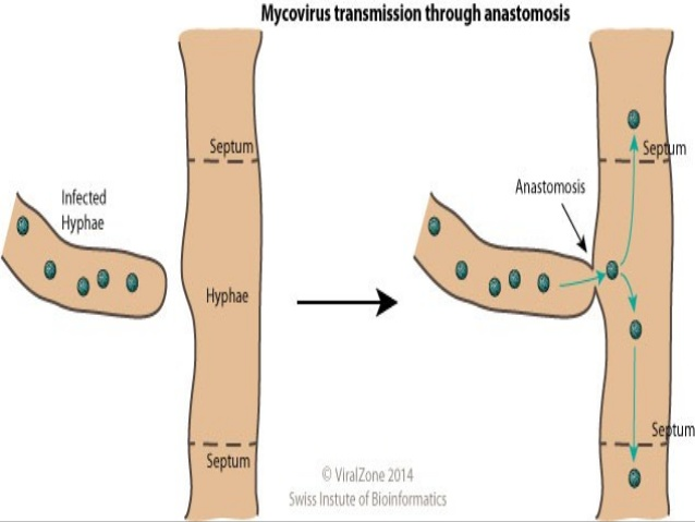 virut1